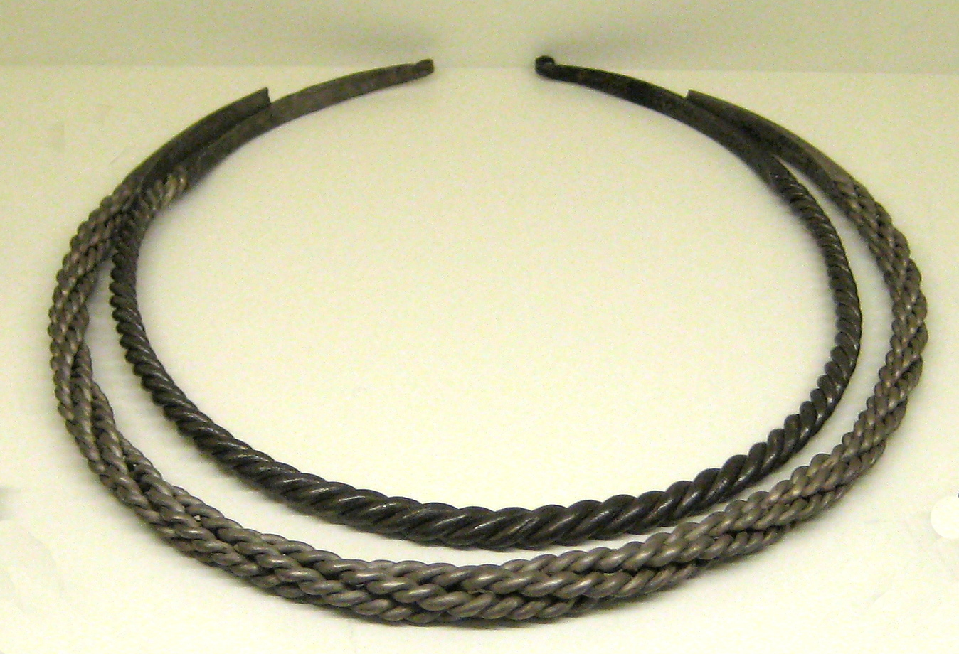 Клады, выставленные в подклете Благовещенского собора Московского кремля. Гривны - шейные обручи. Русь, 12 - начало 13 вв. Серебро, медь, плетение, кожа.